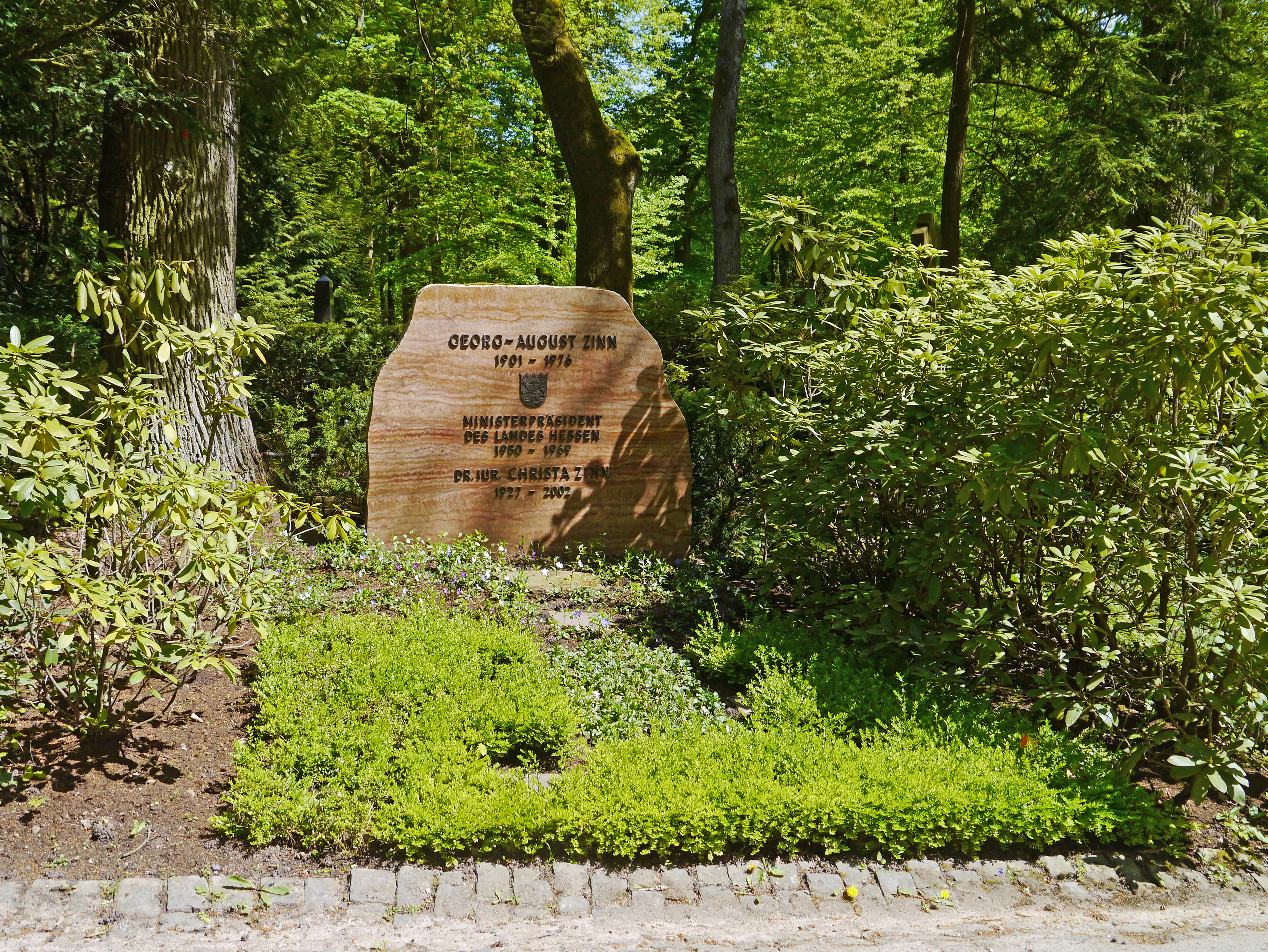 Grab von Georg-August Zinn und seiner Frau Christa, 2016 auf dem Nordfriedhof in Wiesbaden.